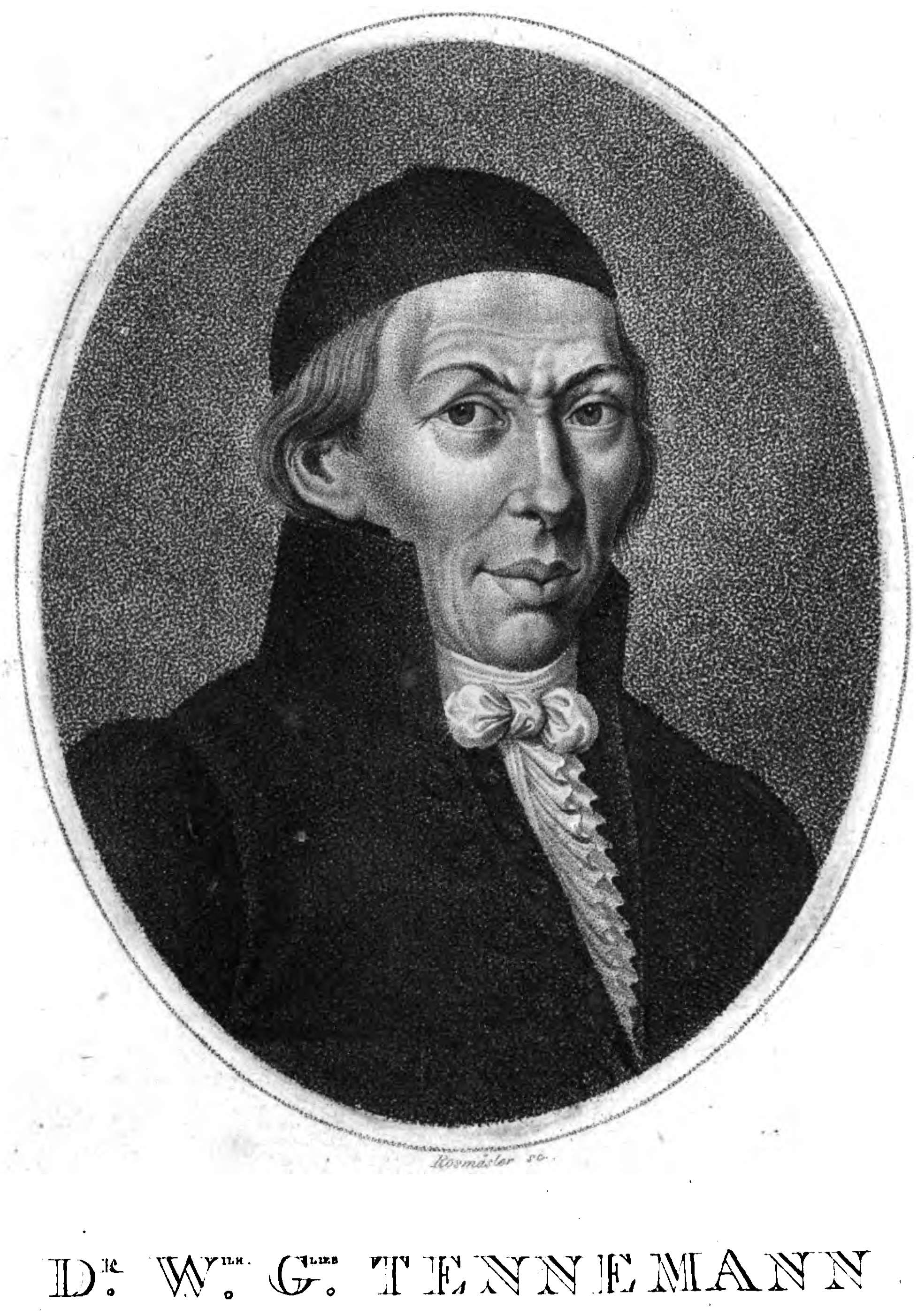 Porträt: Wilhelm Gottlieb Tennemann, (1761-1819) deutscher Philosoph und Historiker. Stich von Rosmäsler, in: Geschichte der Philosophie. Zehnter Band. Nebst dem Bildniß des Verfassers. Johannes Ambrosius Barth, Leipzig 1817